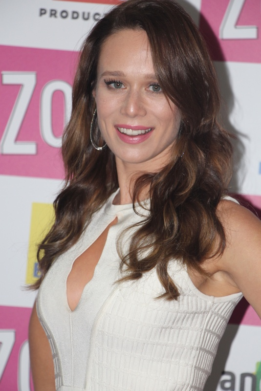 Mariana Ximenez-005